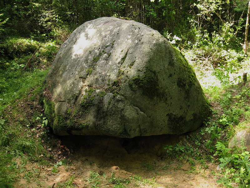 Гароднікі. Вялікі камень